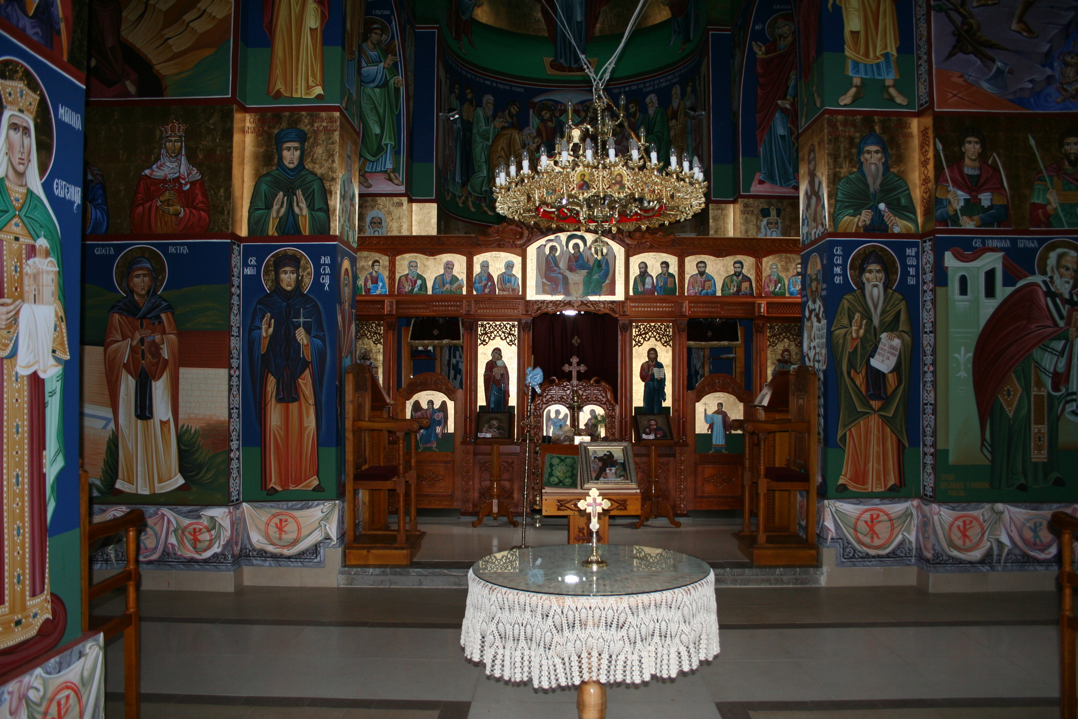 Crkva Svete Trojice u Zasavici II